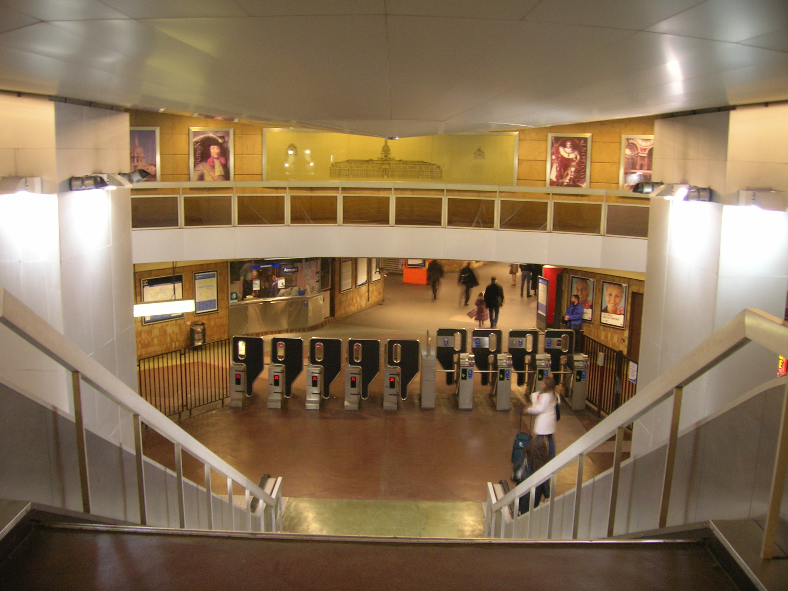 Gare des Invalides, Paris